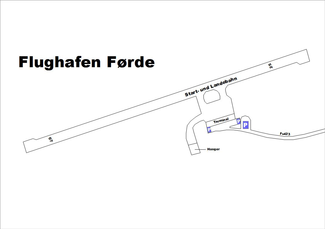 Eine Skizze der für den Passagierverkehr wichtigen Einrichtungen des Flughafens Førde